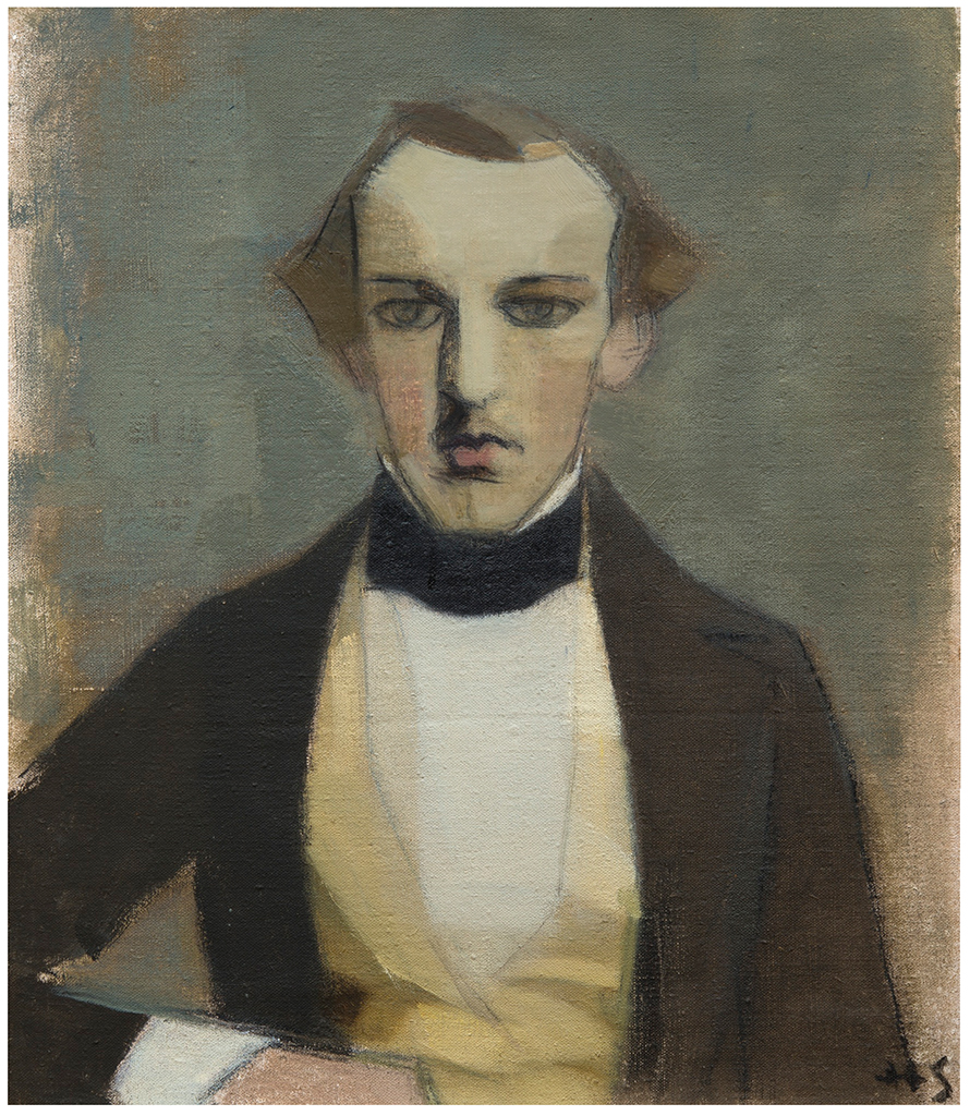 "Мой отец", работа Хелены Шерфбек